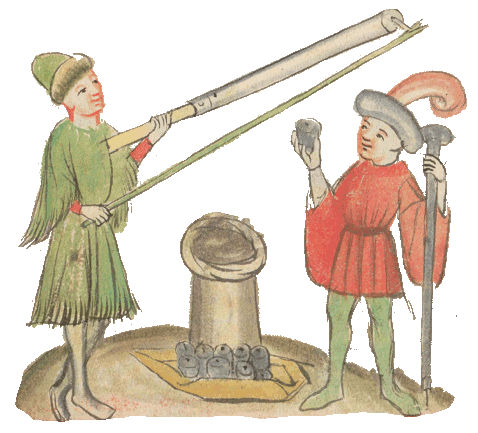 Schütze mit Klotzbüchse